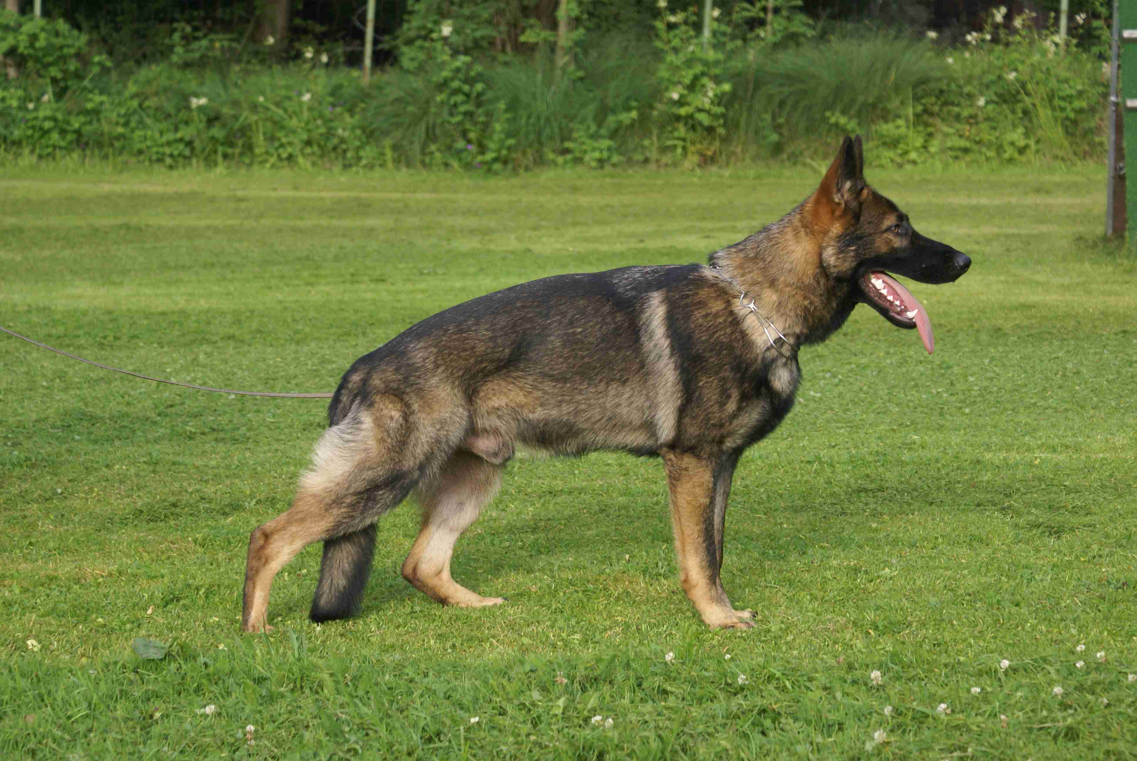 Deutscher Schäferhund "Karlo vom Gernkogel", 8 Monate alt